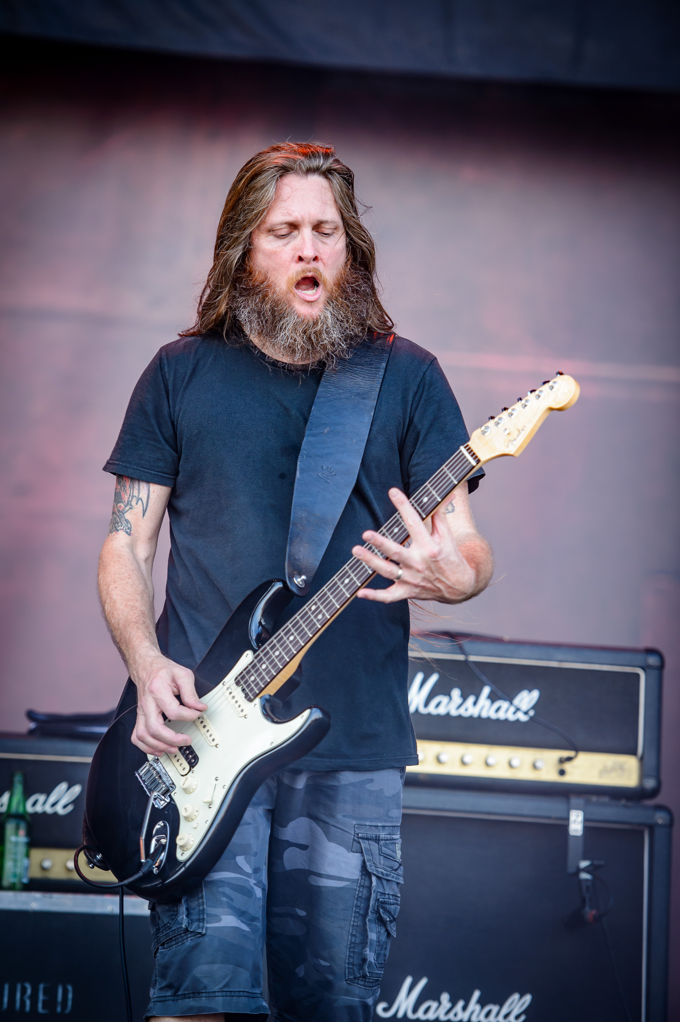 'Summer Breeze Festival 2017; Dinkelsbühl': 'Obituary'